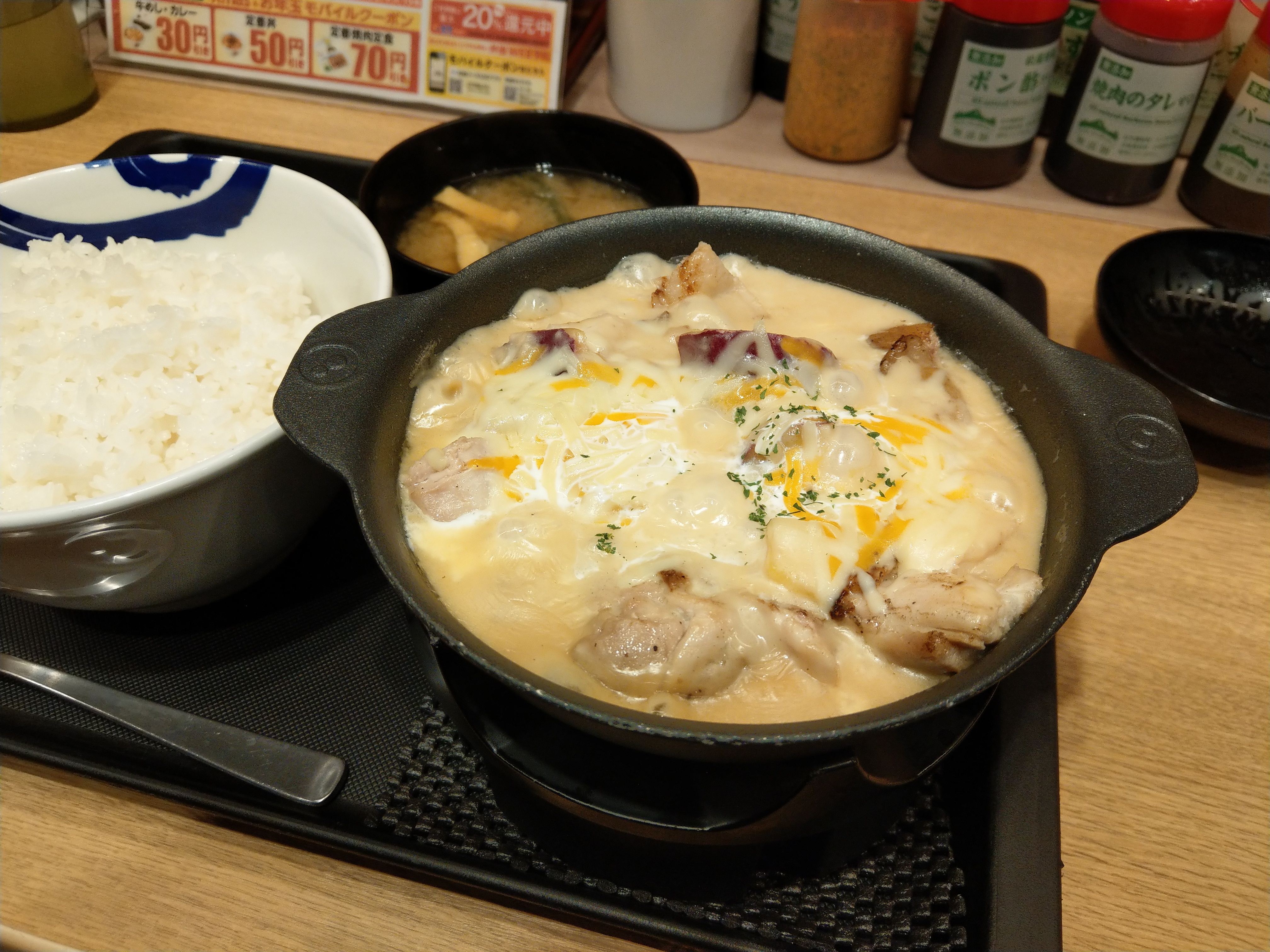 松屋栄三丁目店で提供されたシュクメルリごはんセット。